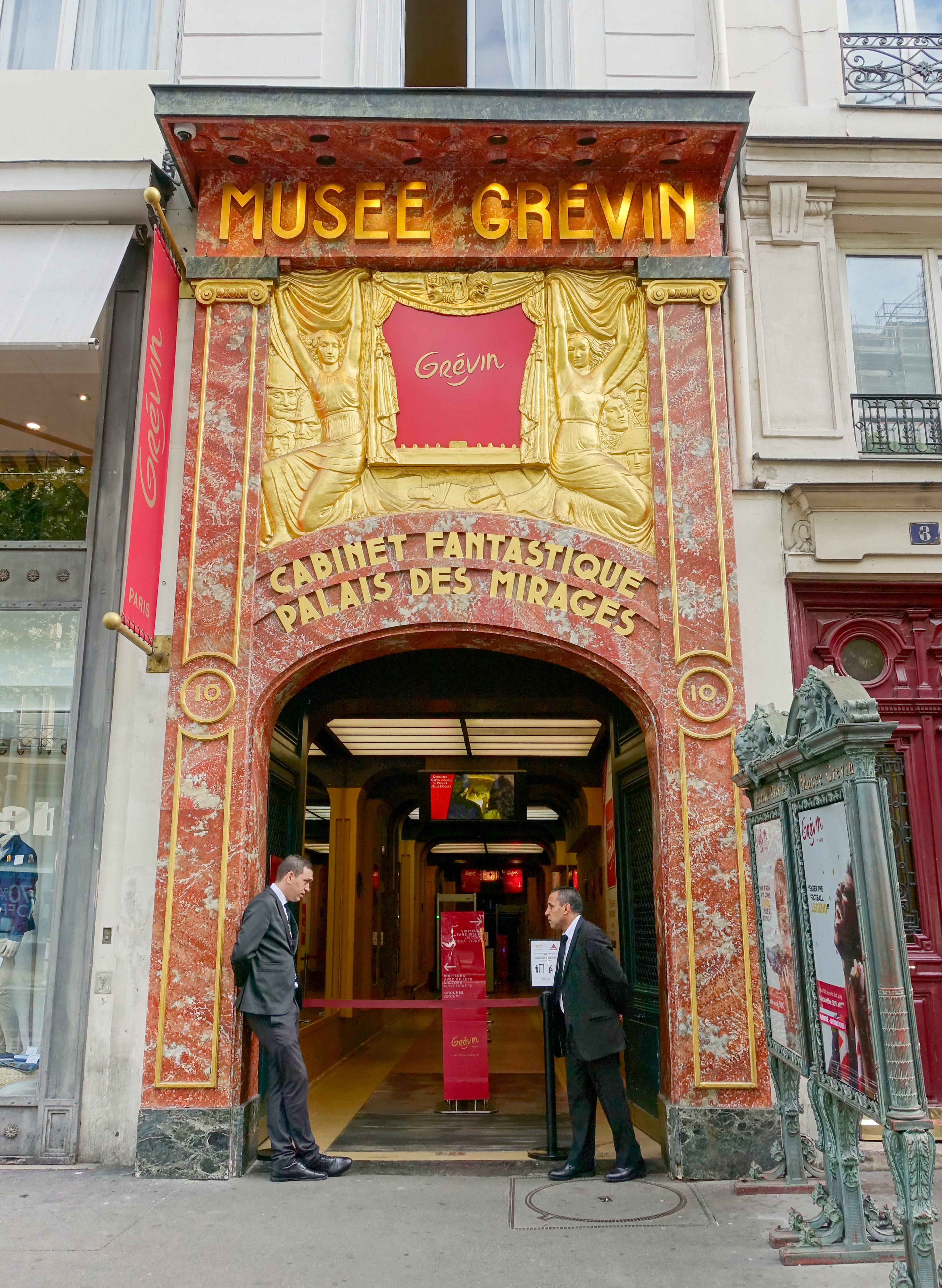 Musée Grévin @ Paris